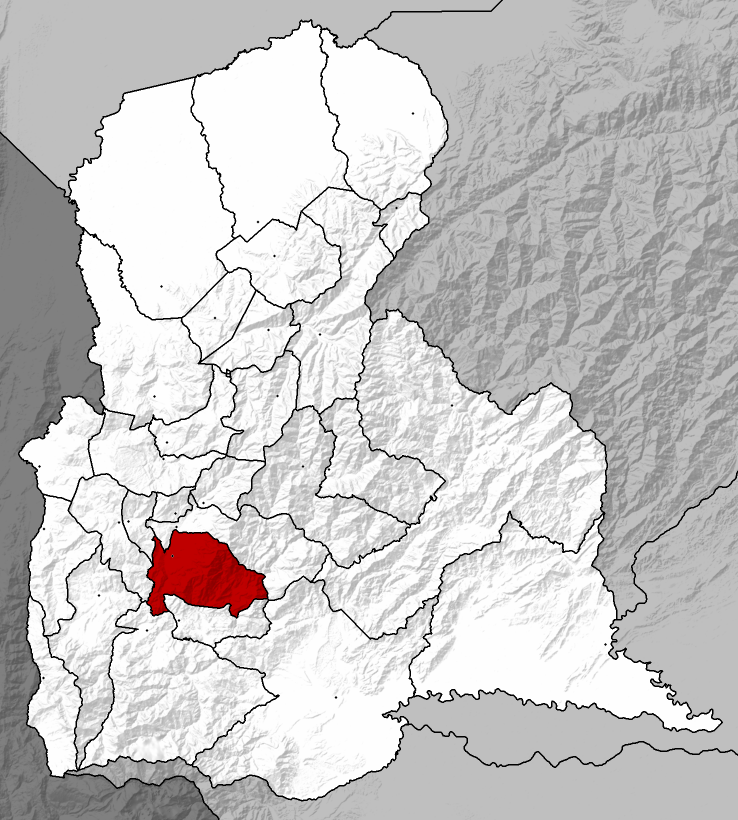 Municipio San Cristóbal - Táchira